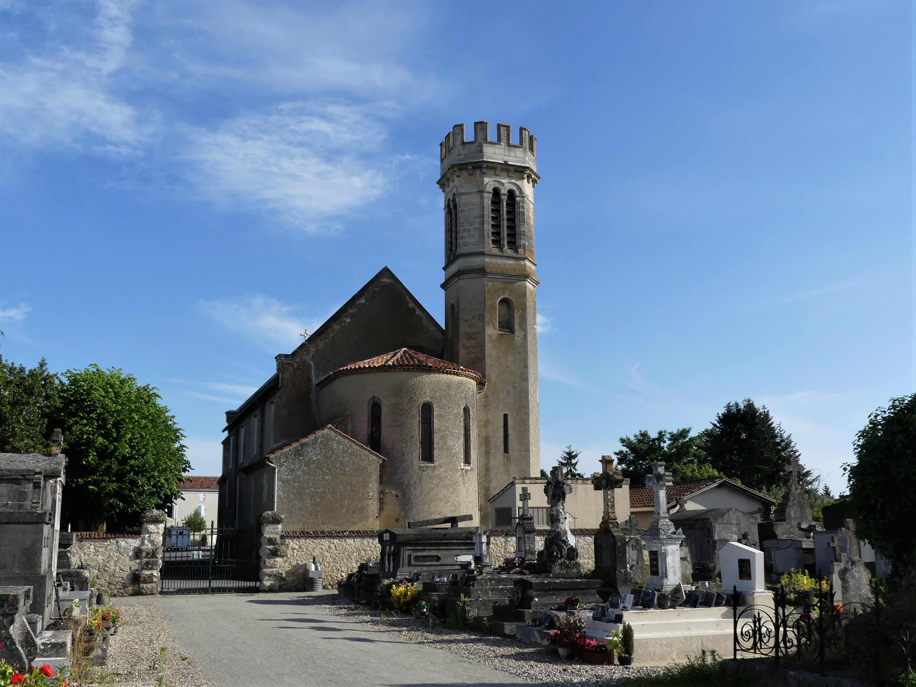 L'église de l'Immaculée-Conception, Colayrac-Saint-Cirq, Lot-et-Garonne, France.